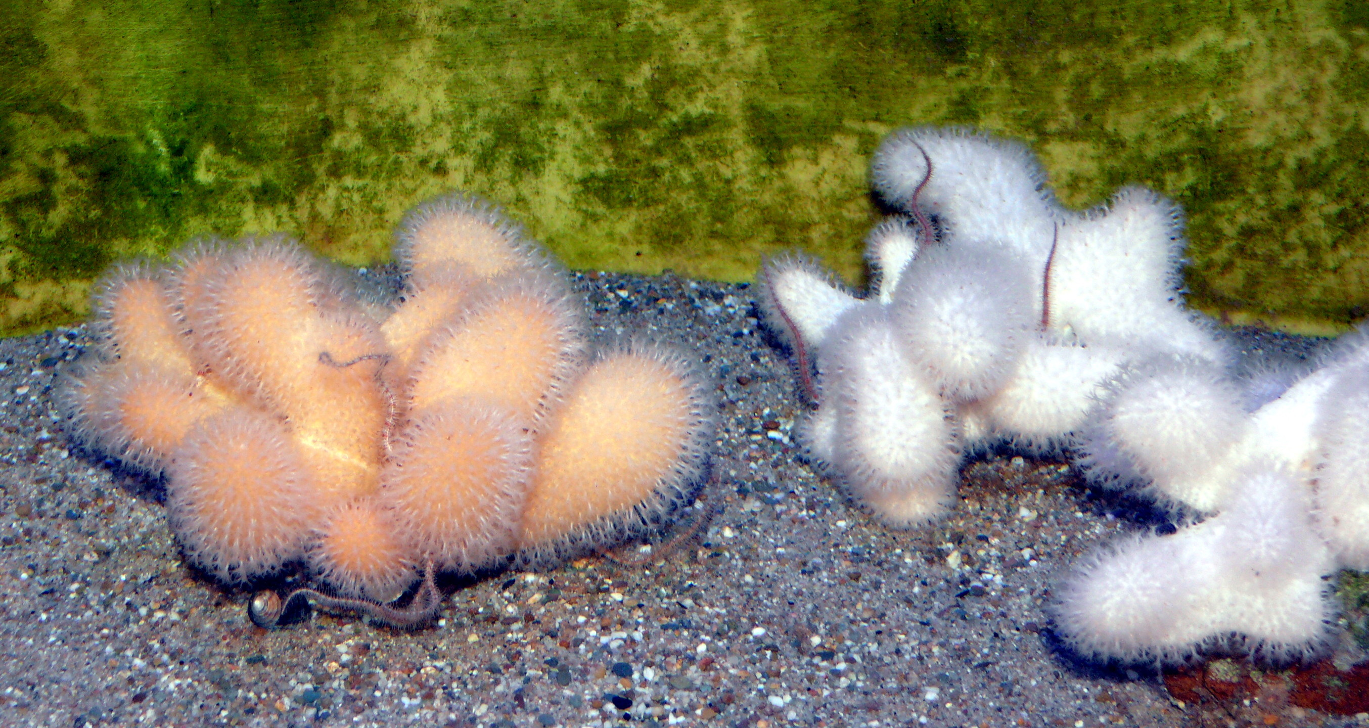 Tote Meerhand (Alcyonium digitatum)